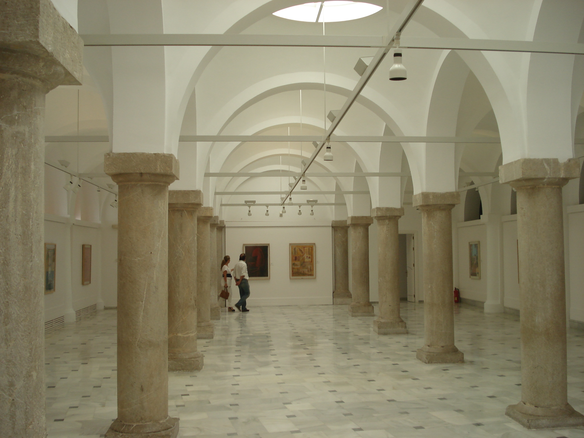 Sala Pescadería Vieja en Jerez de la Frontera